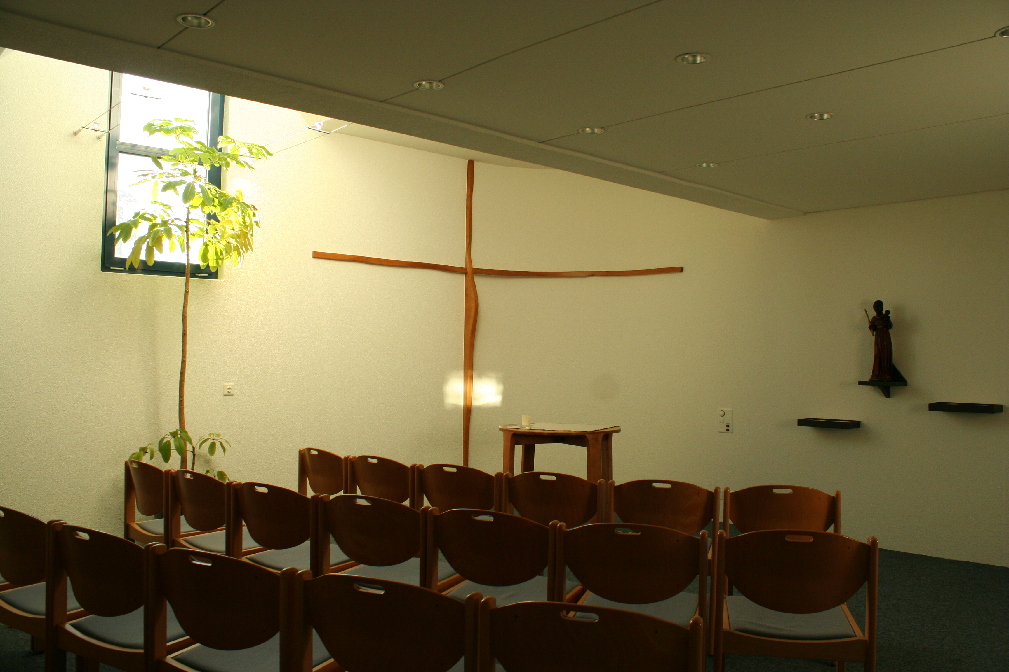 Römisch-katholische Kirche Bruder Klaus Volketswil, Gestaltung von Primo Lorenzetti